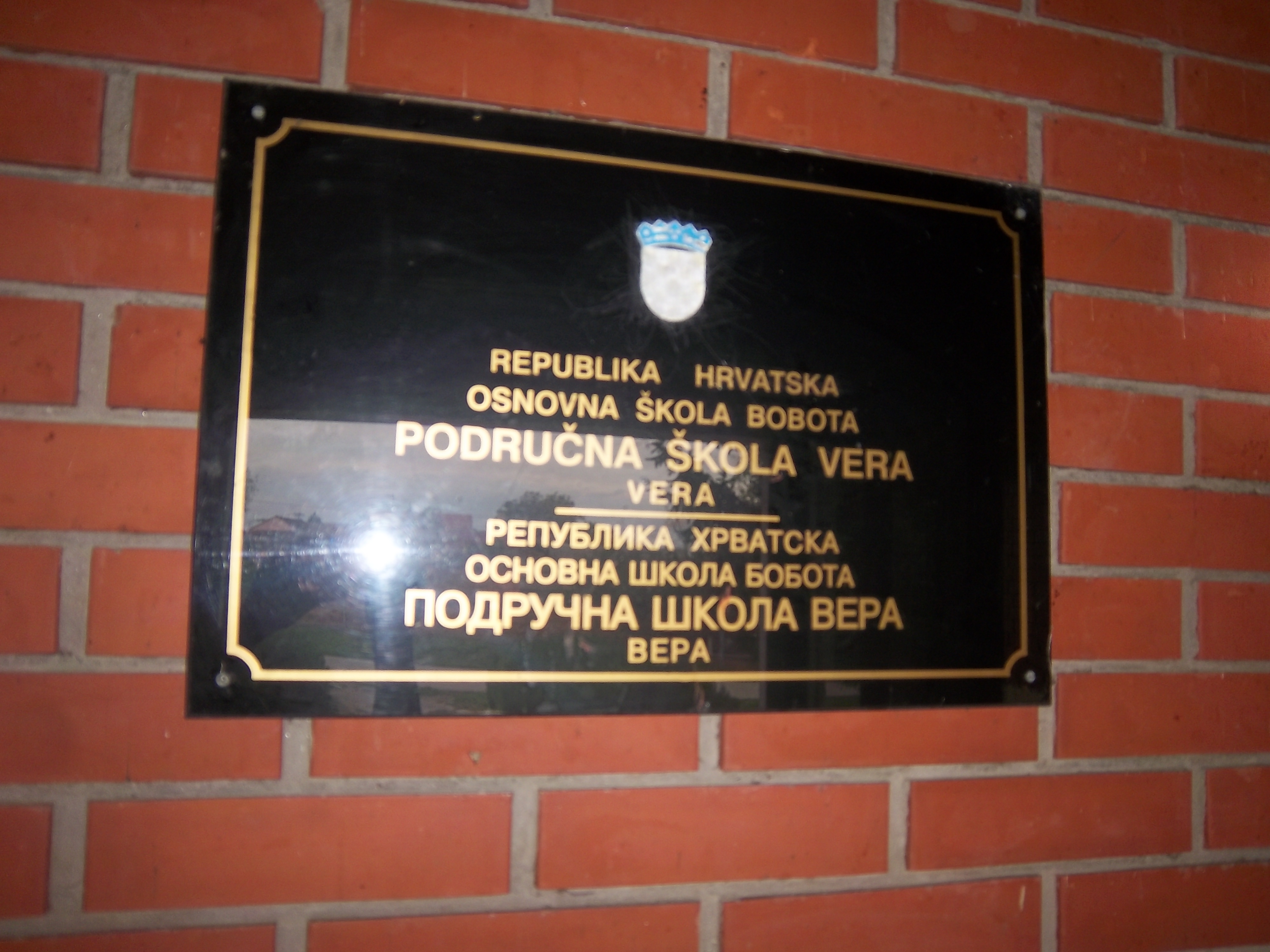 Српски (ћирилица): Насеље Вера у Општини Трпиња у источној Хрватској.